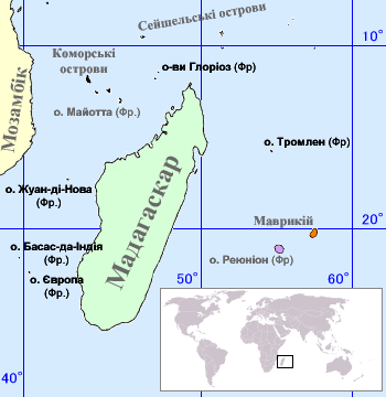 Карта Розсіяних островів в Індійському океані (фр.) українською мовою.